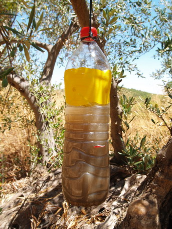 Trampa tipo Olipe hecha con una botella de PET de agua mineral a la que se le ha pintado una banda amarilla para atraer más dípteros y a la que se le han practicado cuatro agujeros de unos 5 mm de diámetro. Está cebada con fosfato biamónico al 4%. Se puede utilizar en capturas de mosca del olivo (Bactrocera oleae), mosca de la fruta (Ceratitis capitata) y otros dípteros.